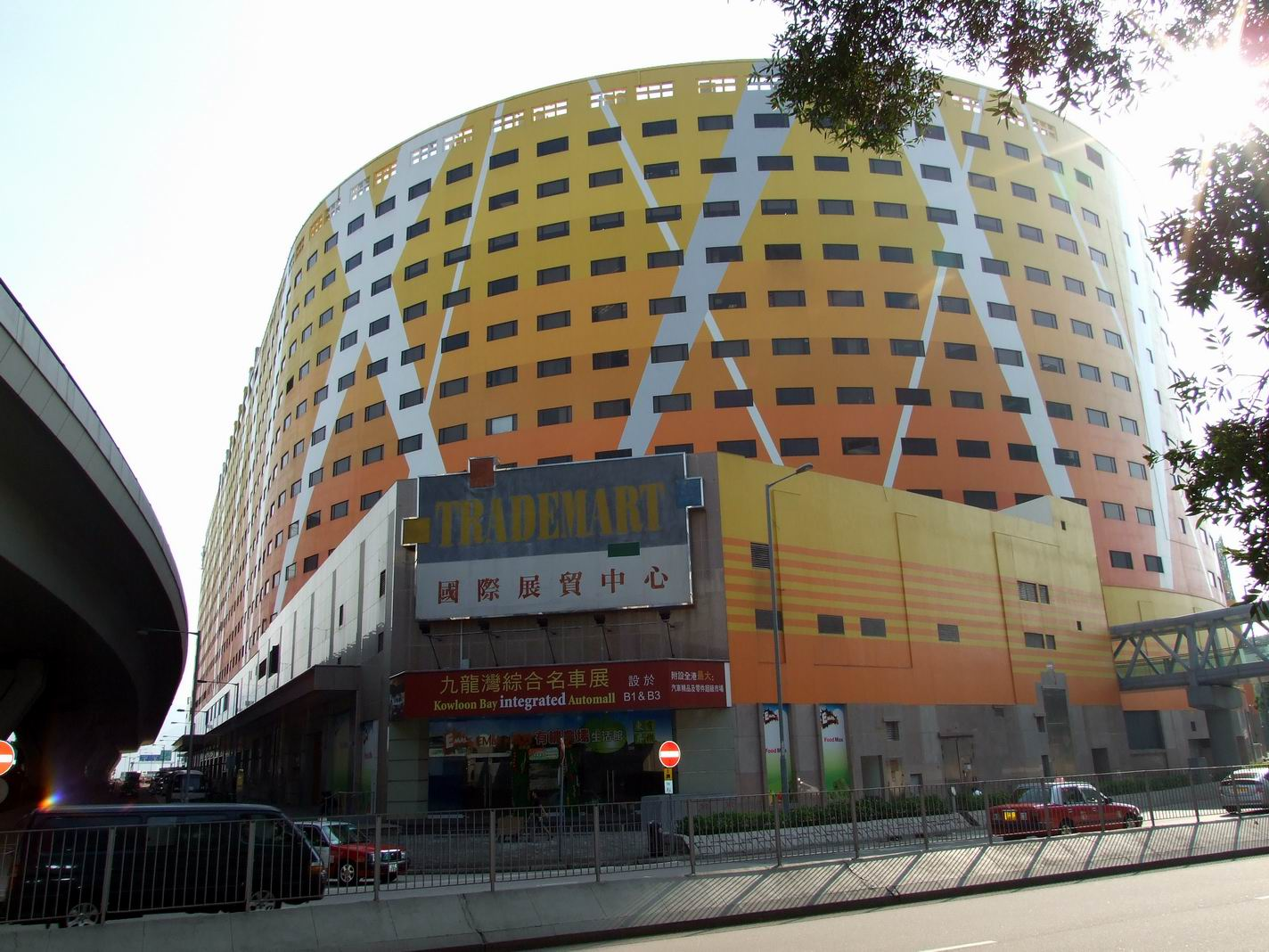 EMAX外觀